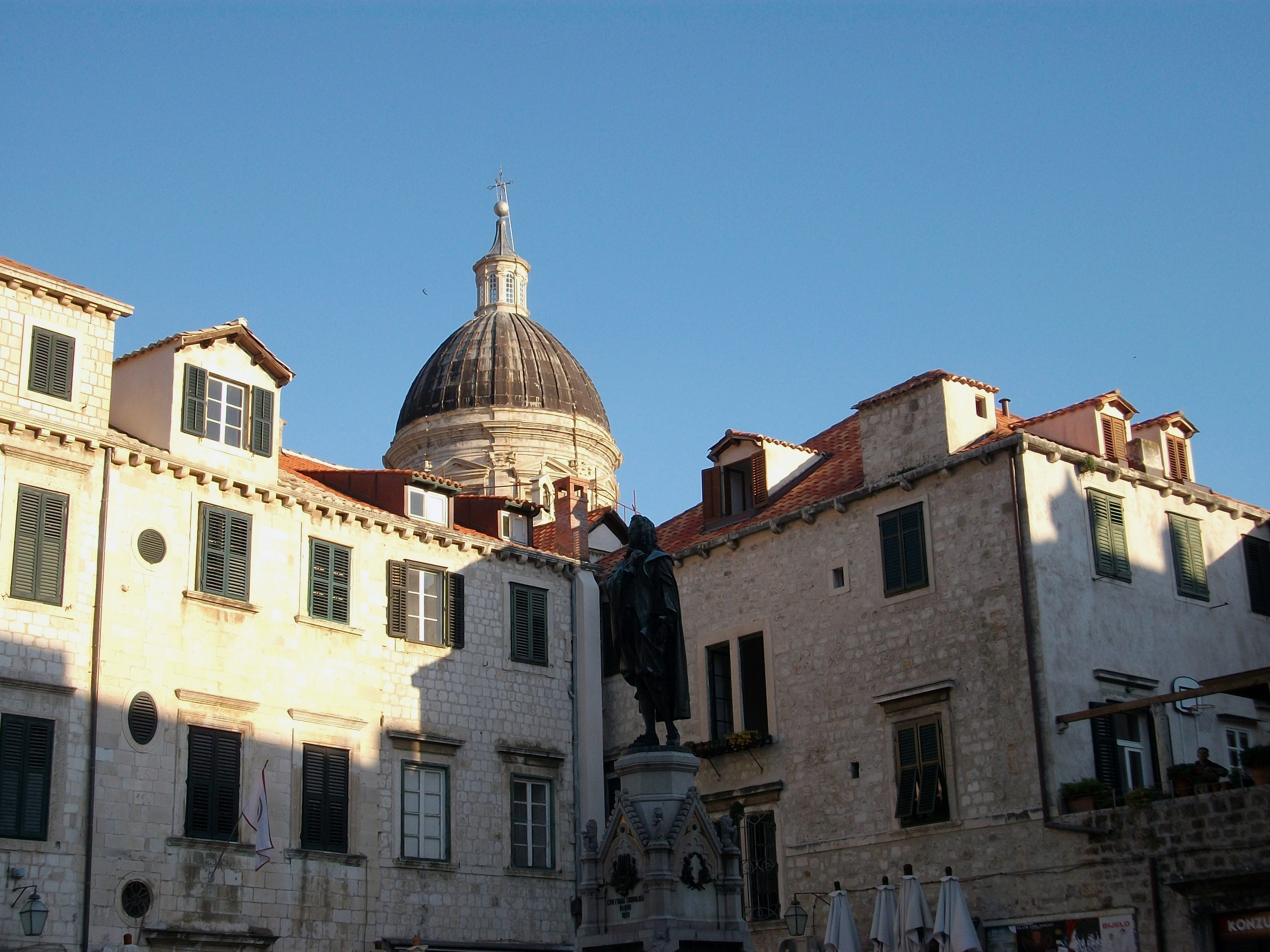 Plaça de Gundulić, Dubrovnik.